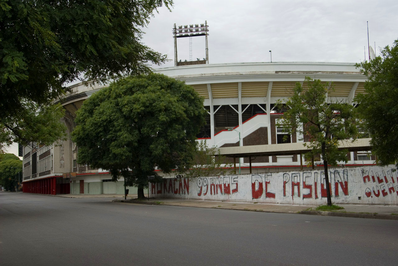 Stadium Tomás Adolfo Ducó